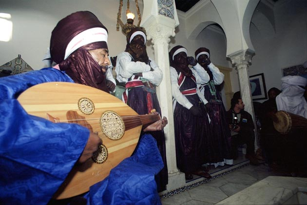 Le chanteur algérien Othmane Bali au cours d'une soirée musicale à Alger.